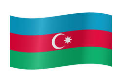 Le drapeau d'Azerbaidjan